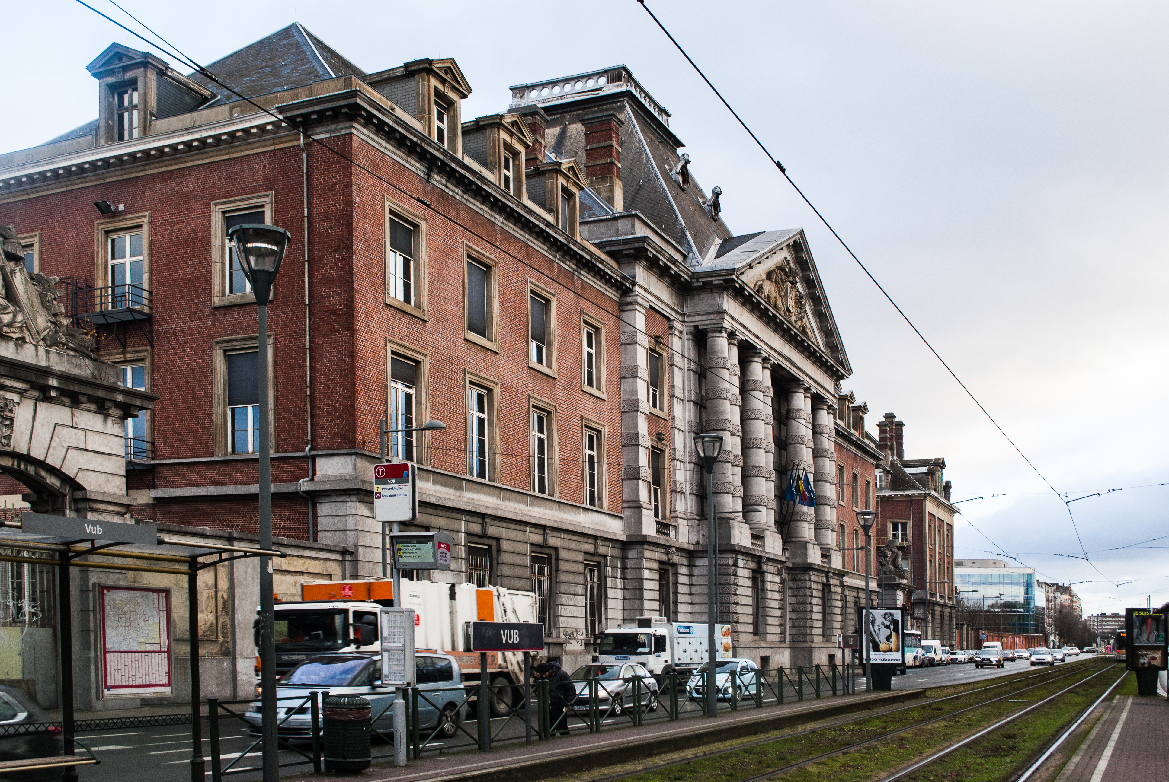 Casernes des guides, Boulevard général Jacques, Ixelles